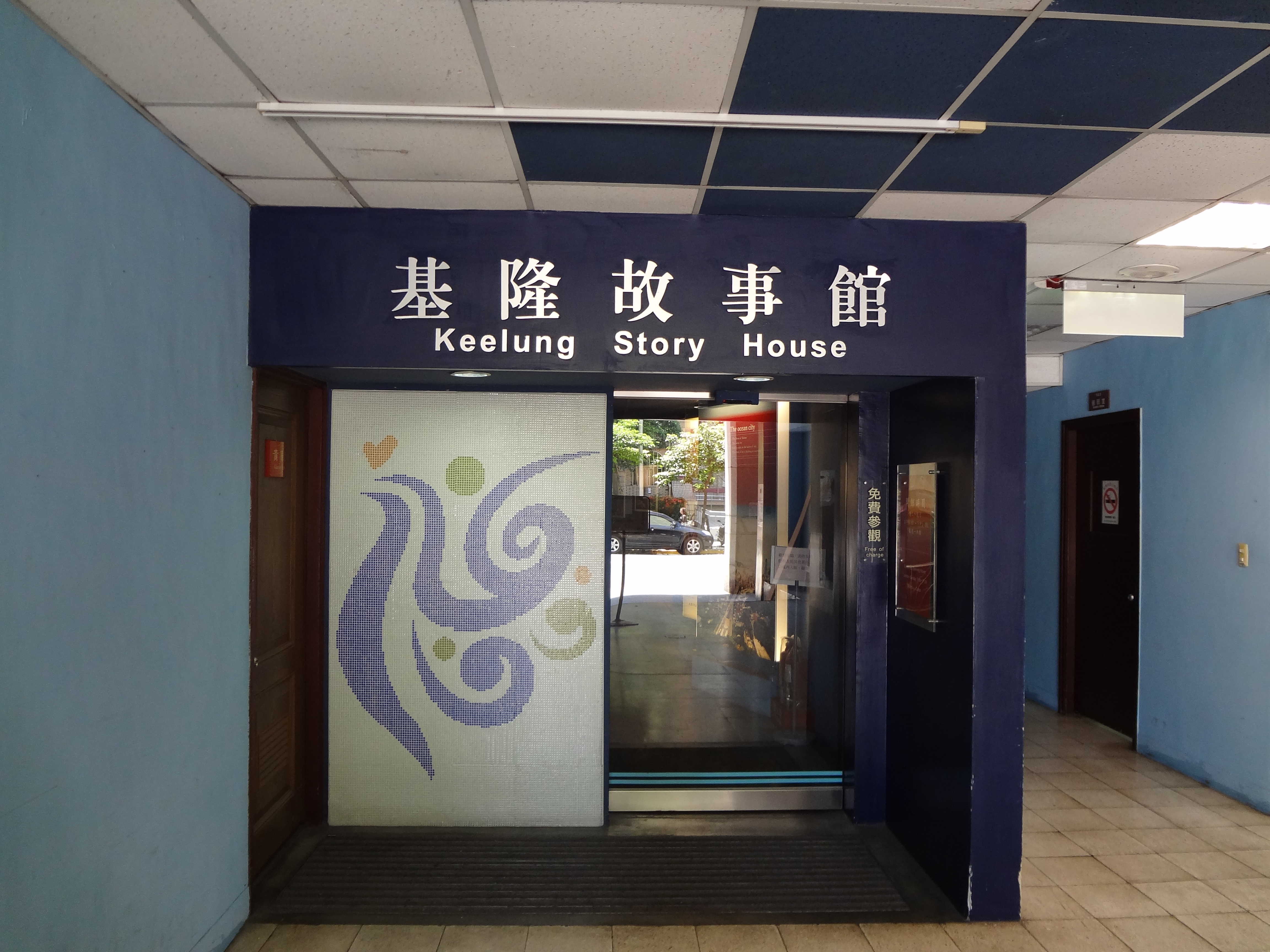 基隆故事館，位於基隆文化中心義一路入口。